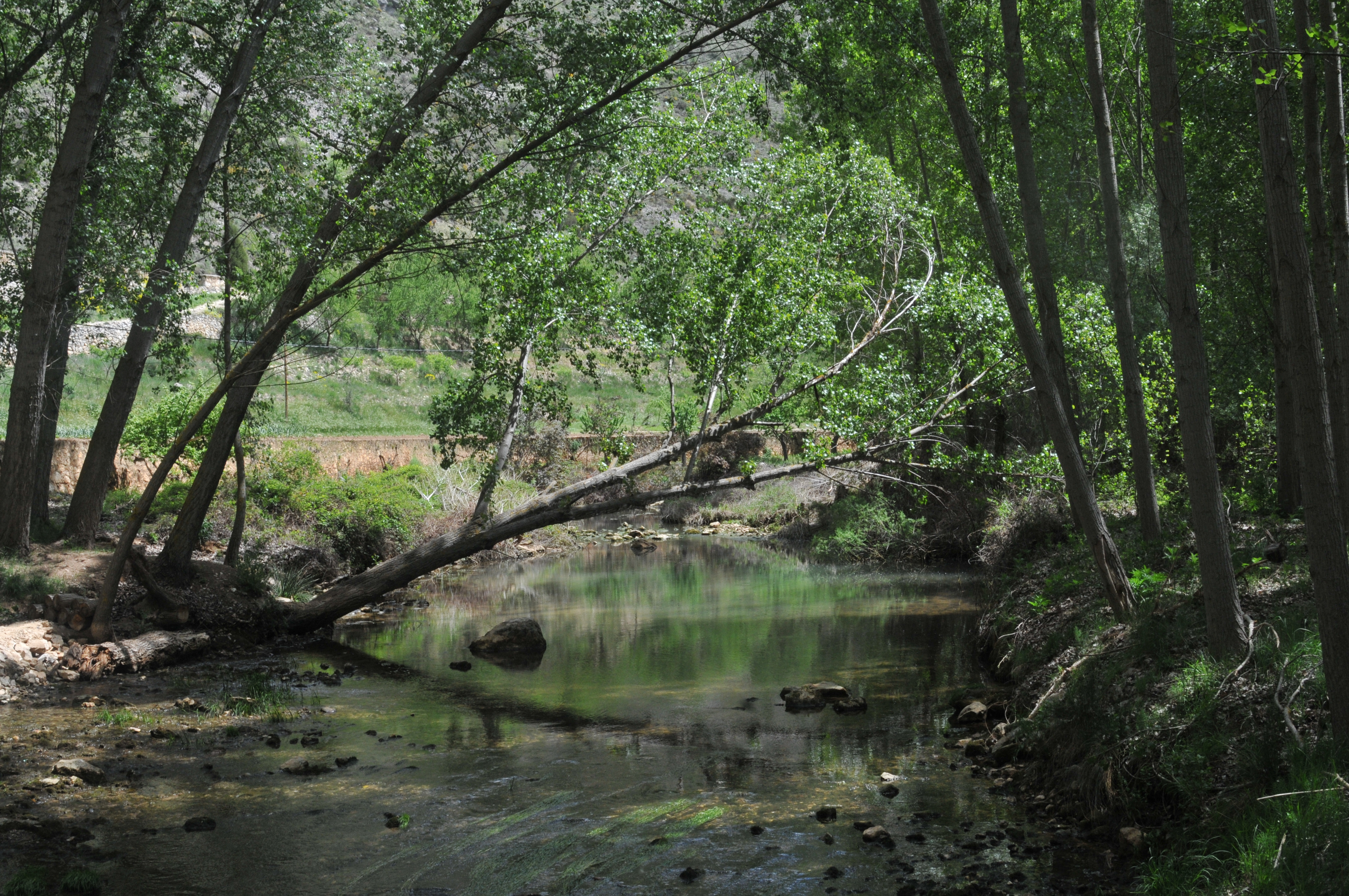 RIO RIAZA